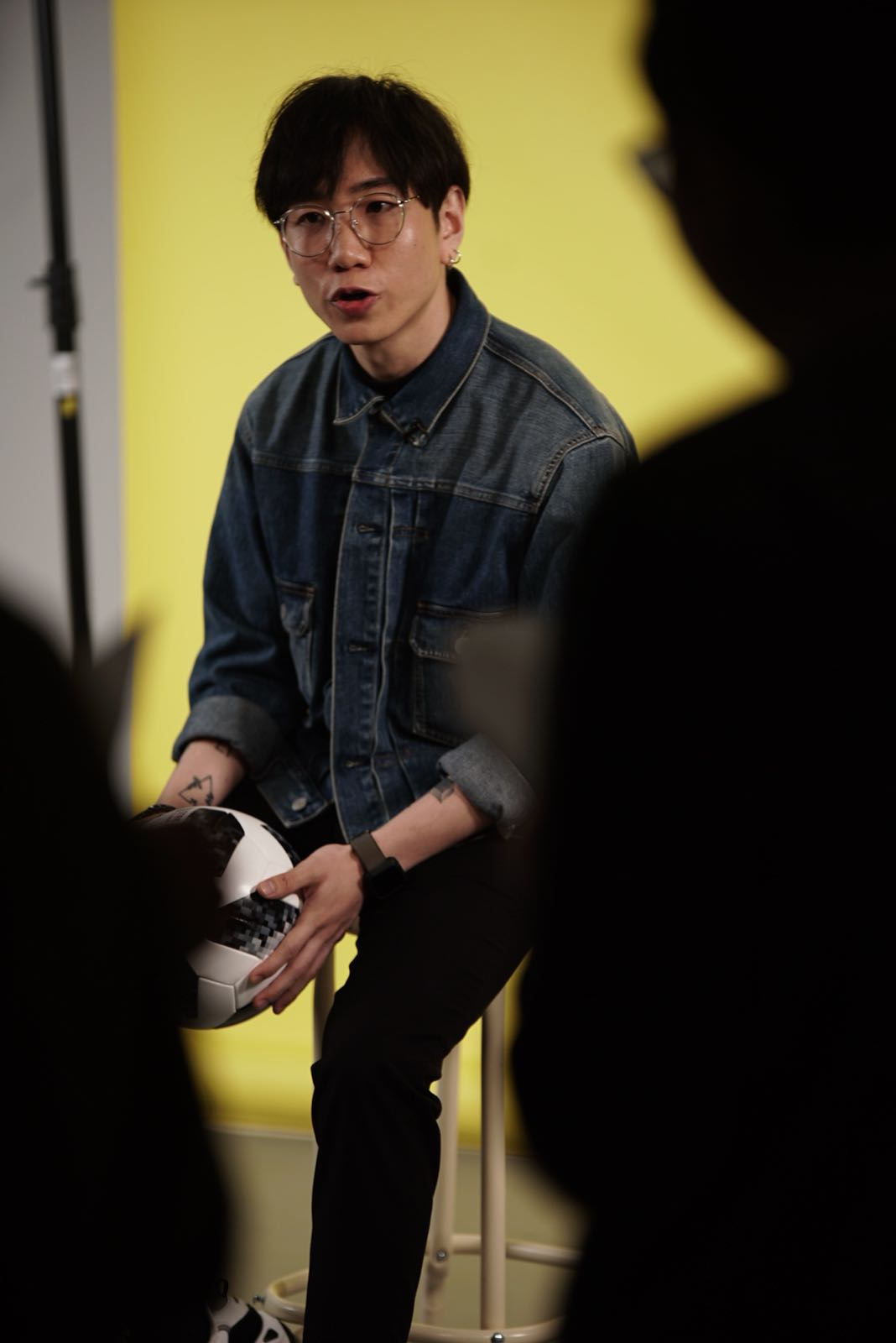 香港01訪問